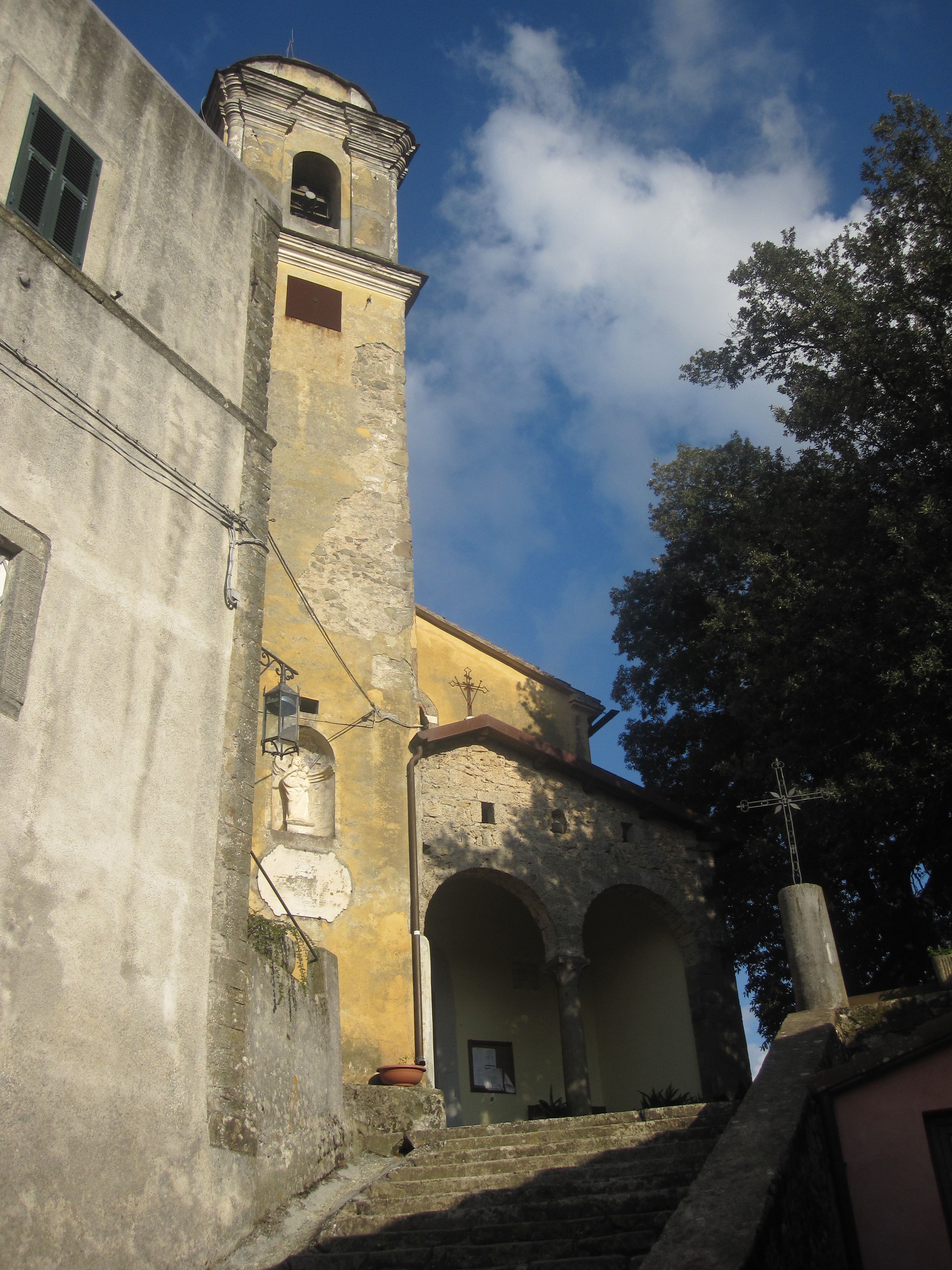 Opera propria, Matteo Tamburini